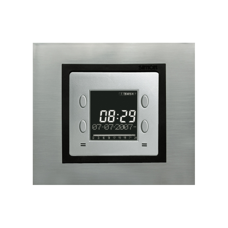 Zegar cyfrowy serii Simon Akord, 2004 rok. Ówczesna nazwa producenta: Fabryka Sprzętu Elektrotechnicznego „KONTAKT” Spółka Akcyjna.